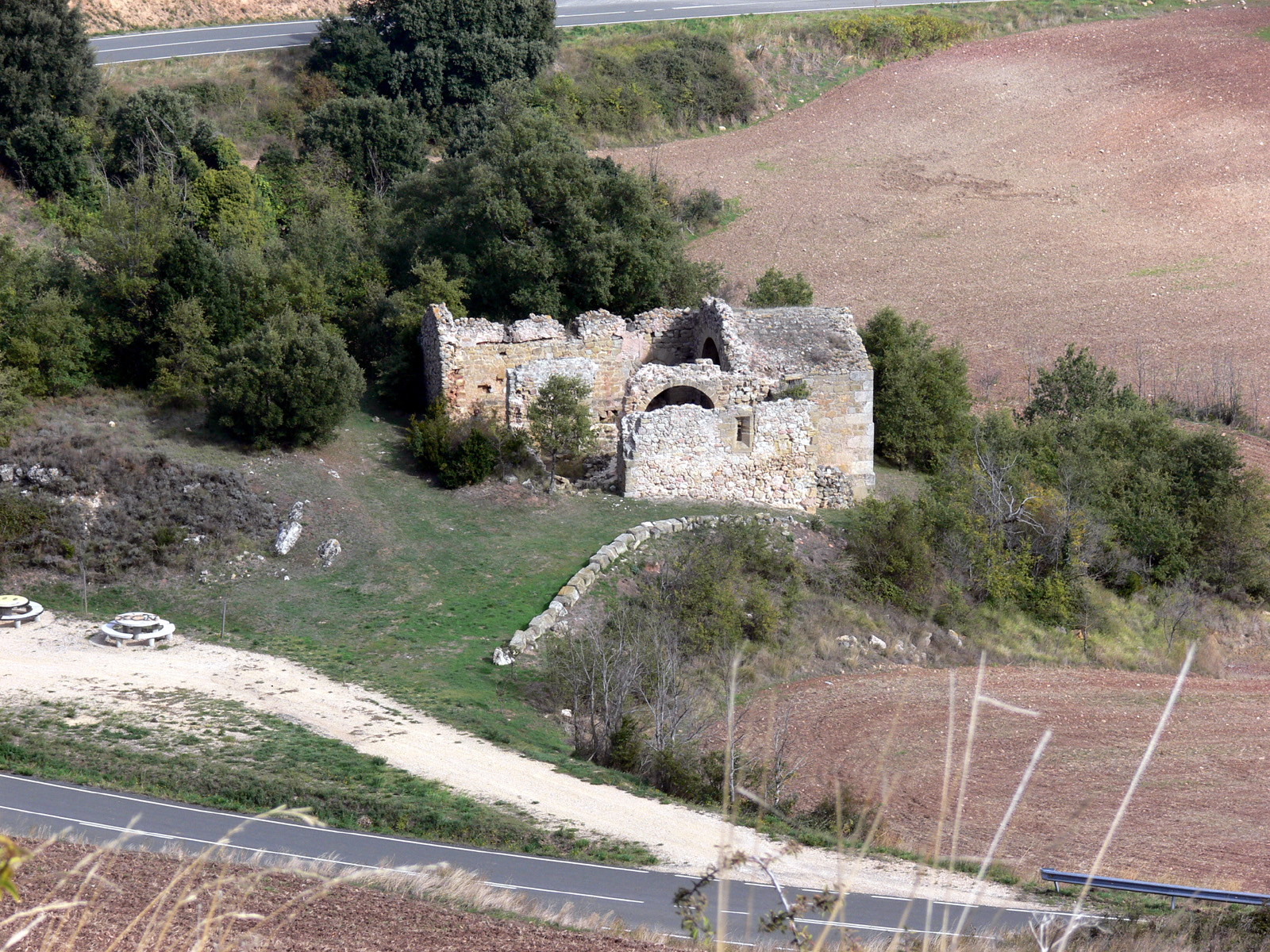 Ermita de Nuestra Señora del Barrio en Cellorigo, La Rioja - España.